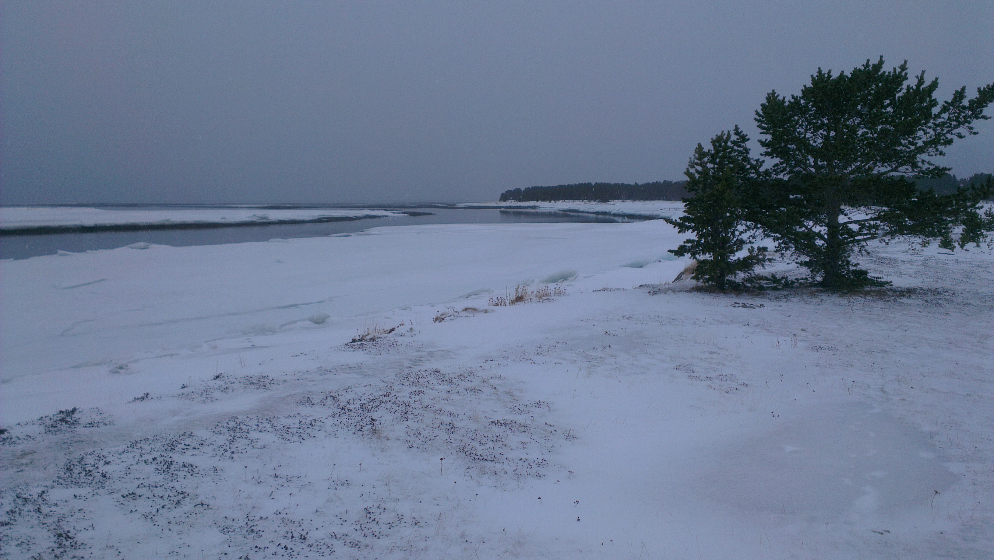 Utløpet av Skibotnelva i Troms